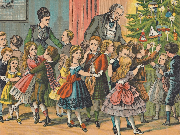 Woonkamer vol keurig geklede kinderen die bij de kerstboom dansen. Uit: H. J. Overbeek, De kerstboom en andere verhalen, 1877. Signatuur: KW BJ Z2141